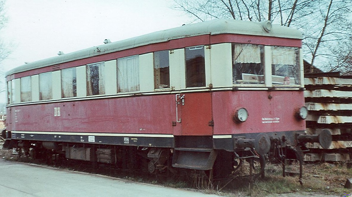 VT 135 539 abgestellt in Wittenberge